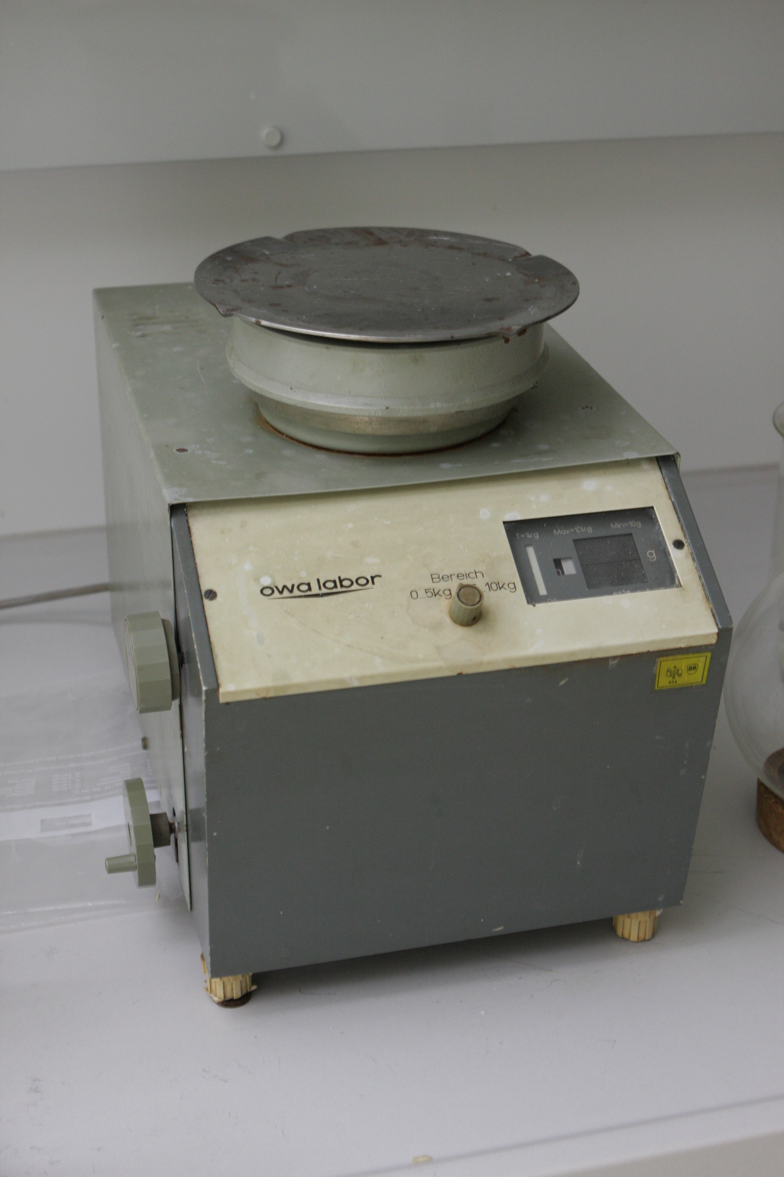 OWA Laborwaage, bzw. Feinwaage; Genauigkeit von 0,01g